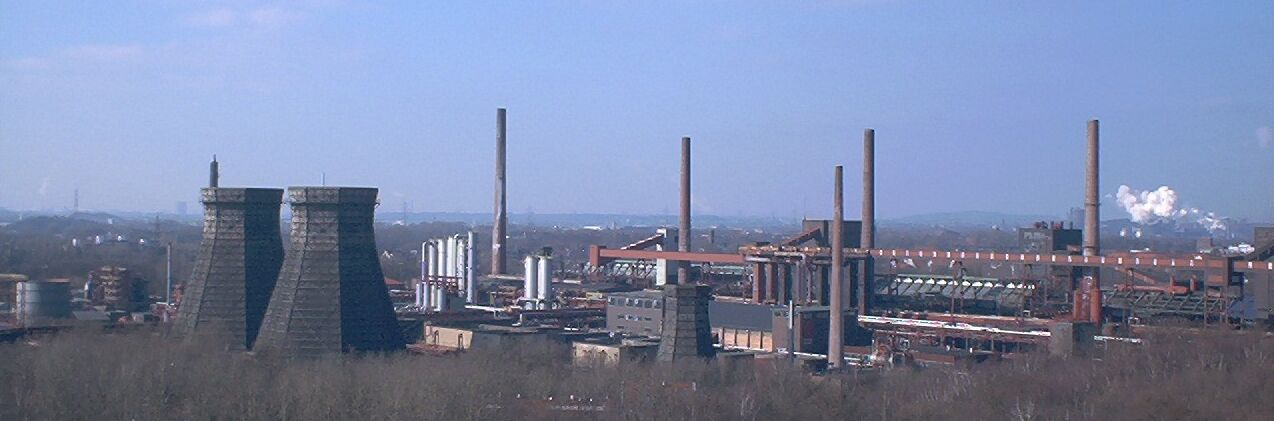 Kokerei Zollverein, zweiter Teil